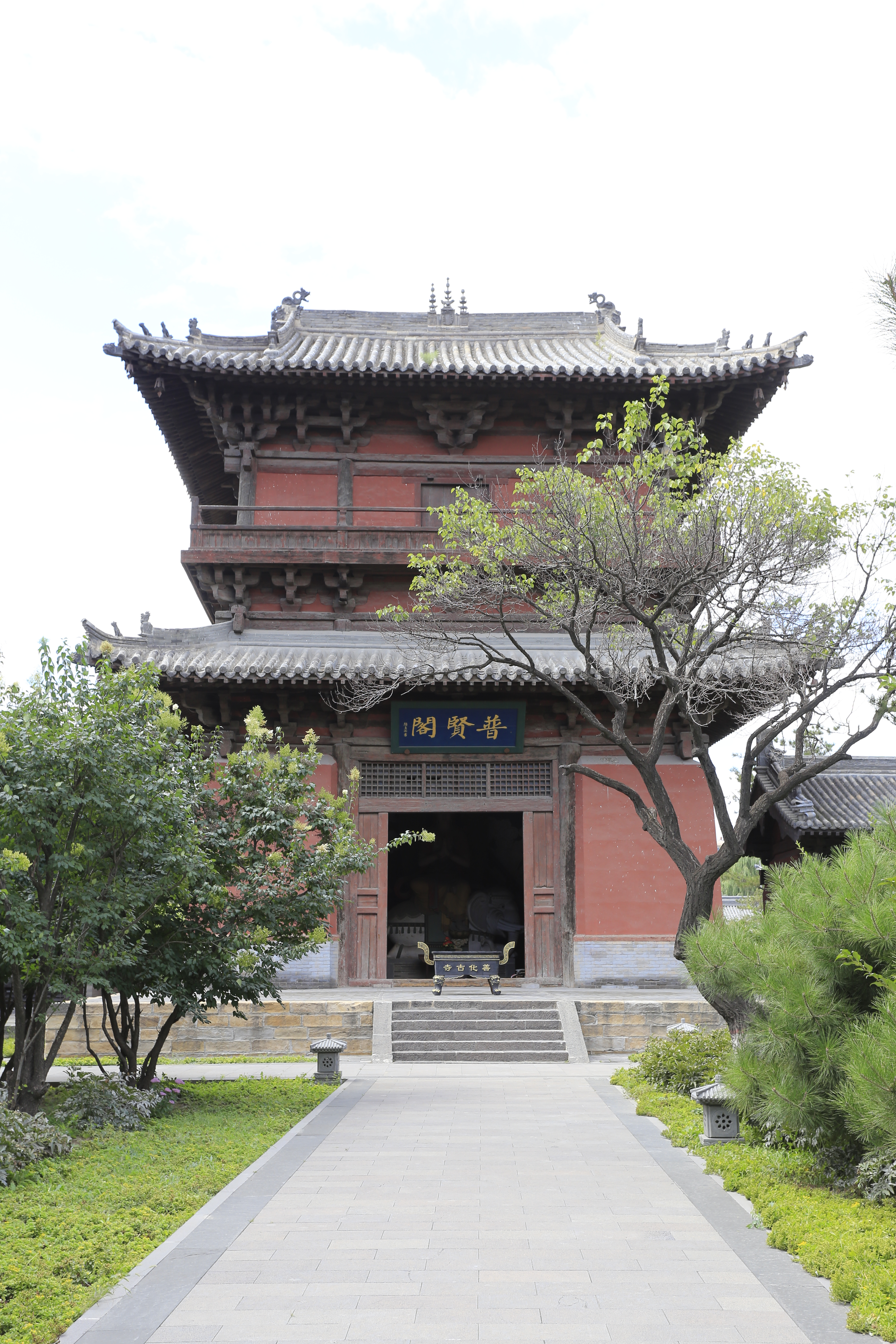 大同善化寺—— 普贤阁